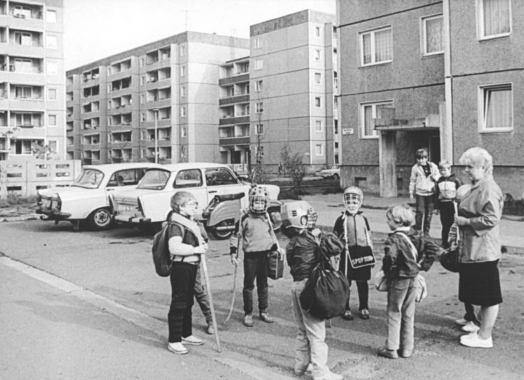 Weißwasser, Eishockey-Mannschaft ADN-ZB Weisflog 26.10.1988 Bez. Cottbus: Jugend-Die Glasmacherstadt Weißwasser ist bei den Sportfans hauptsächlich durch die hier beheimatete Dynamo-Eishockey-Mannschaft bekannt. Begeistert gehen bereits die Steppkes zum Training, um der Hartgummischeibe nachzujagen. -siehe auch 1988-1026-2N